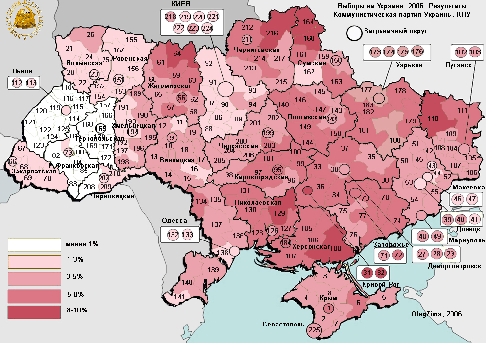 map